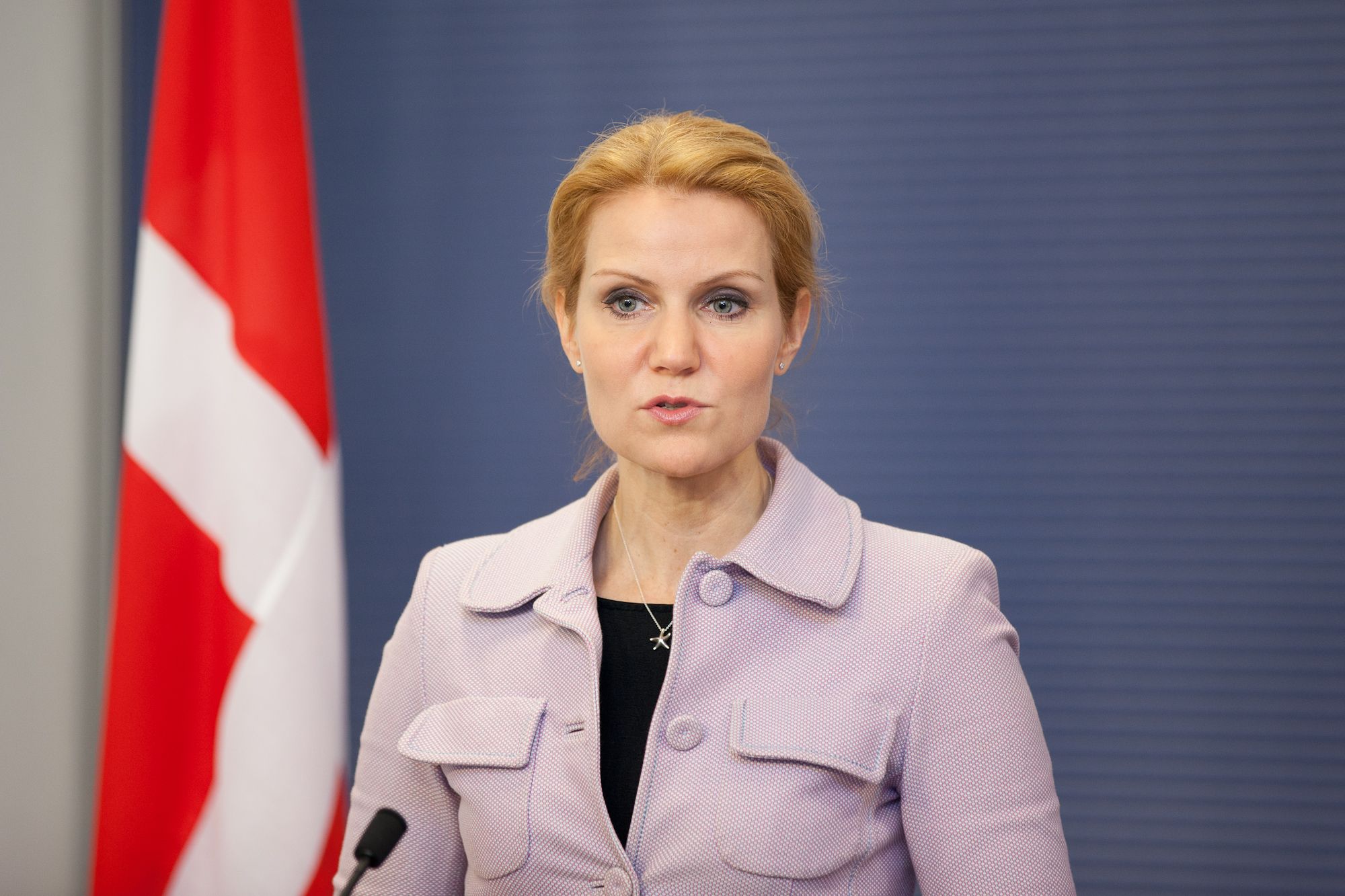 Attēlā: Dānijas premjerministre Helle Torninga-Šmita Foto: Toms Norde/Valsts kanceleja